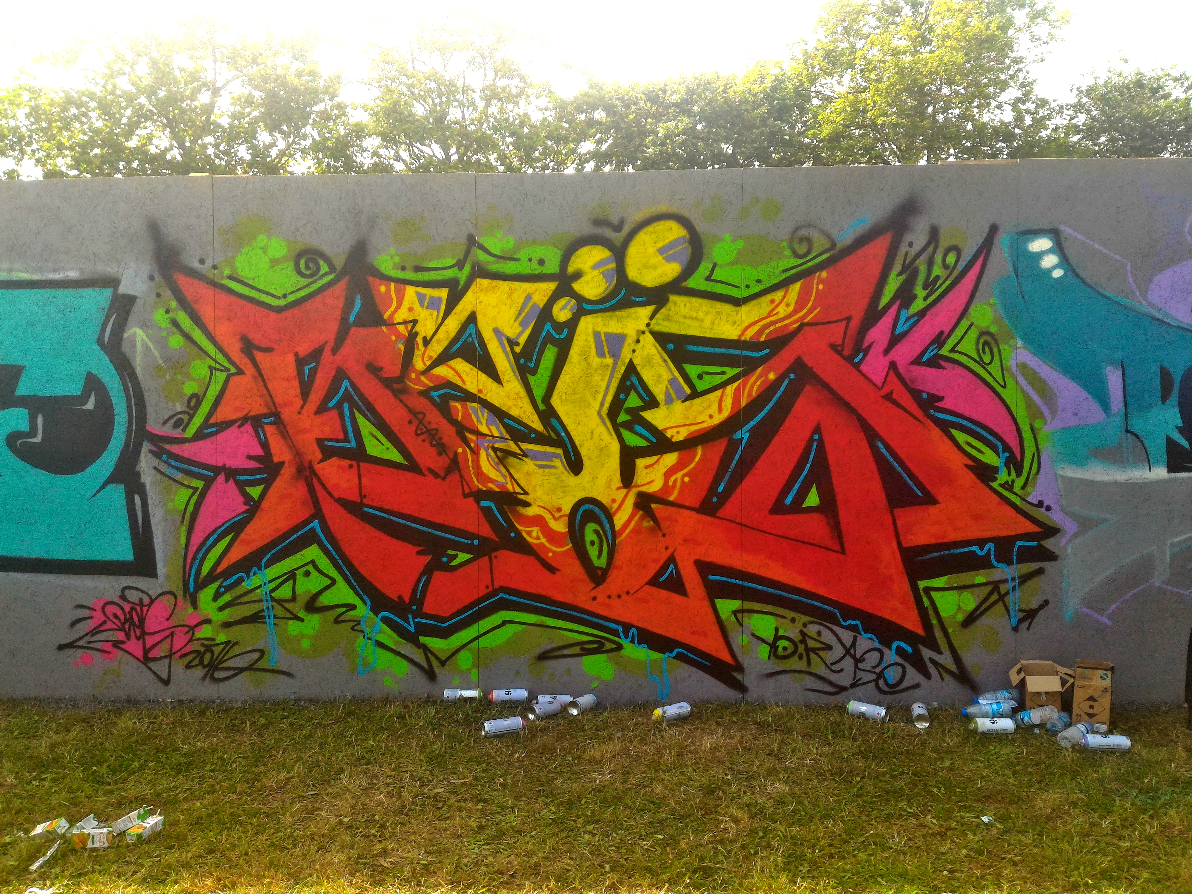 İstanbul graffiti festivalinden bir graffiti.